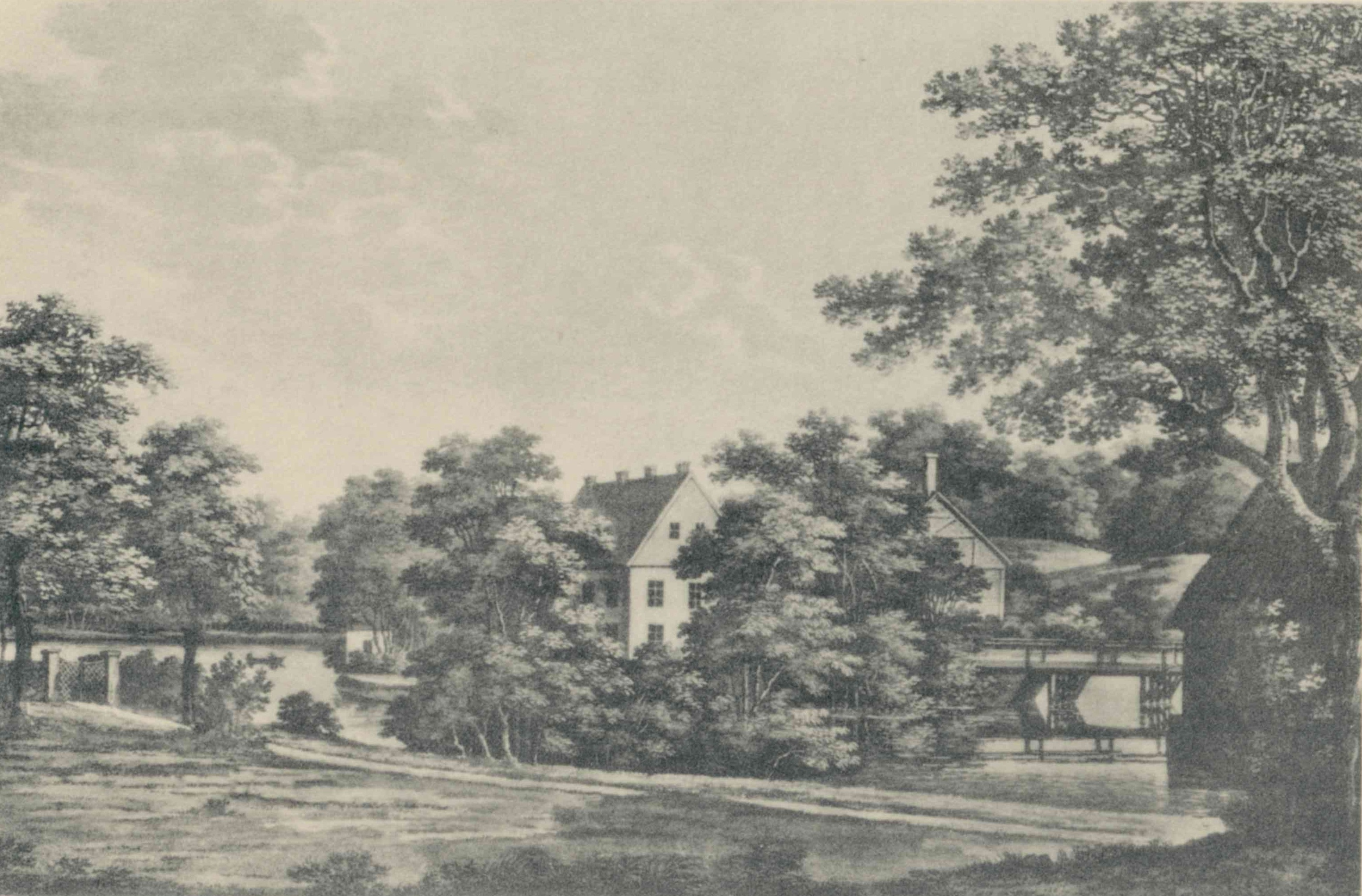 Bjärsgård